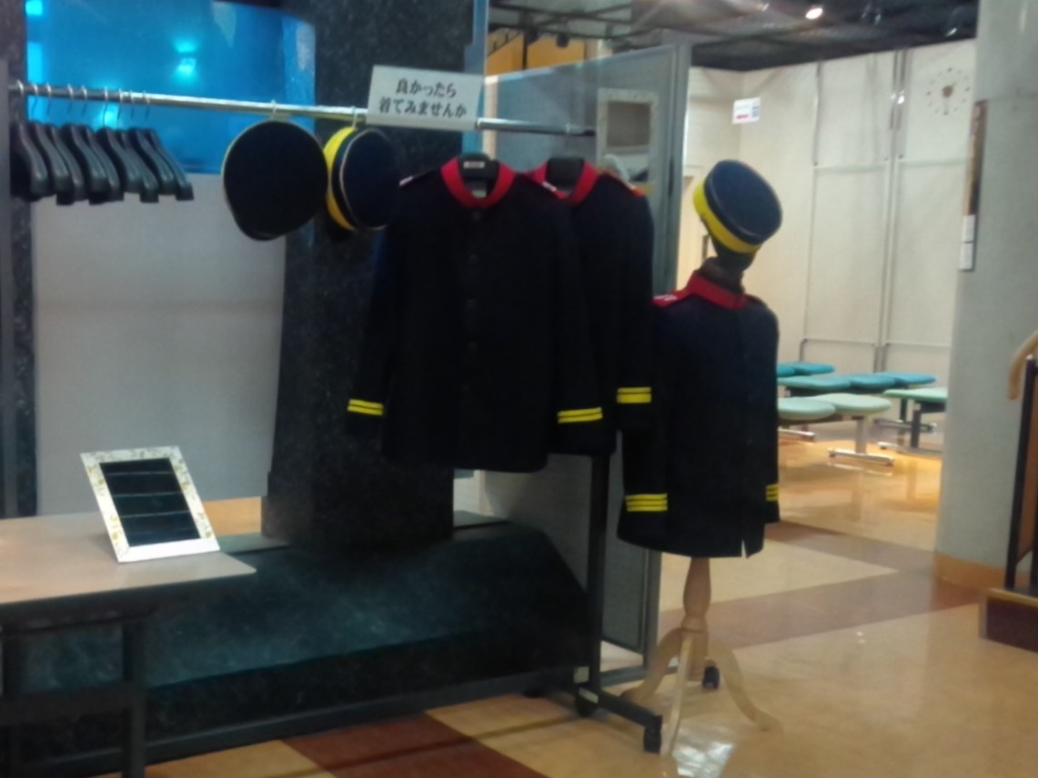 2020/2/20北鎮記念館にて撮影